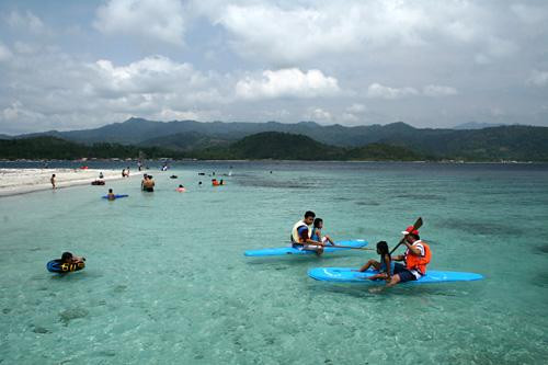 Pantai Mutun di Teluk Lampung yang dikenal sangat indah oleh masyarakat lokal